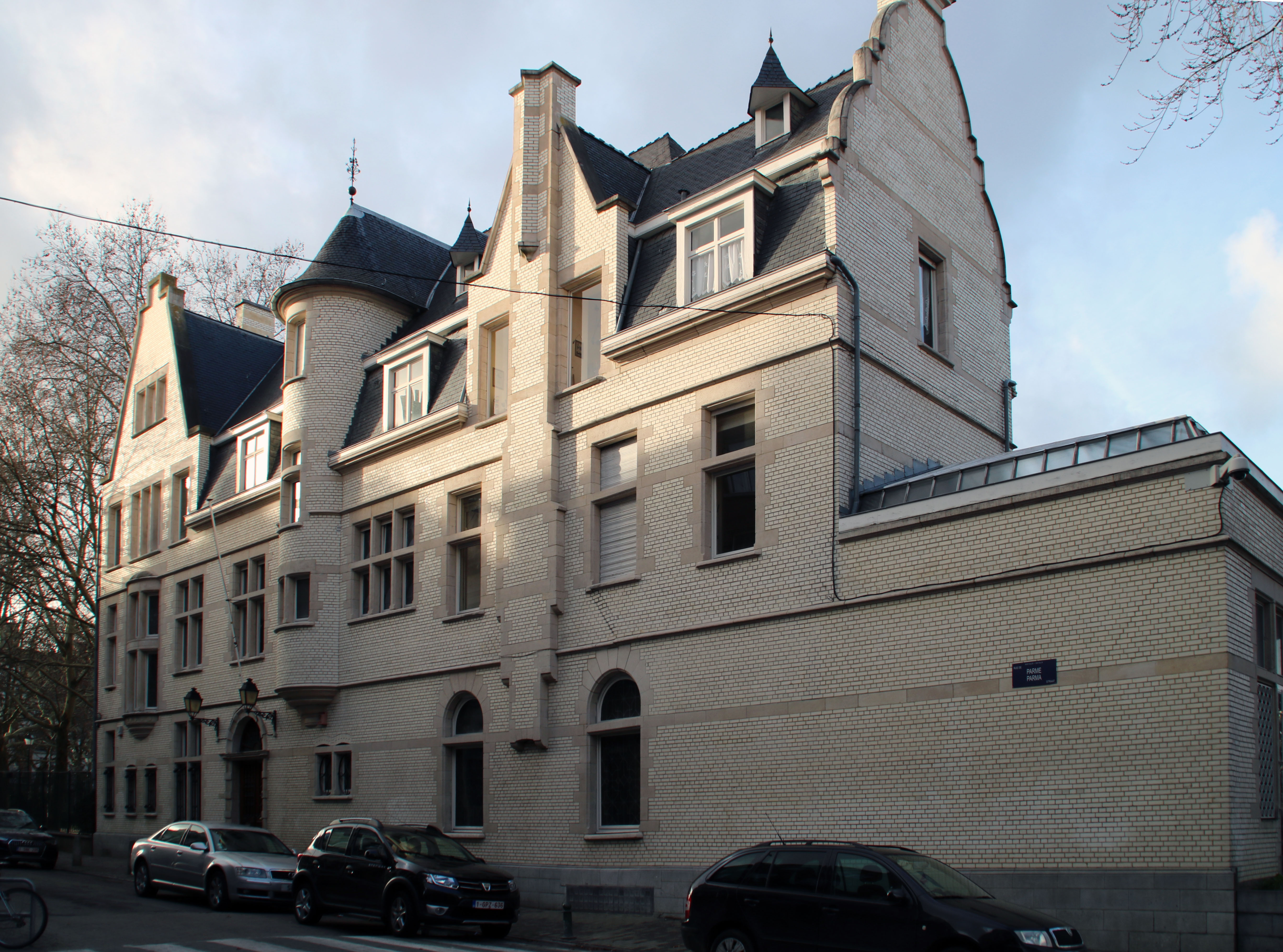 Maison privée